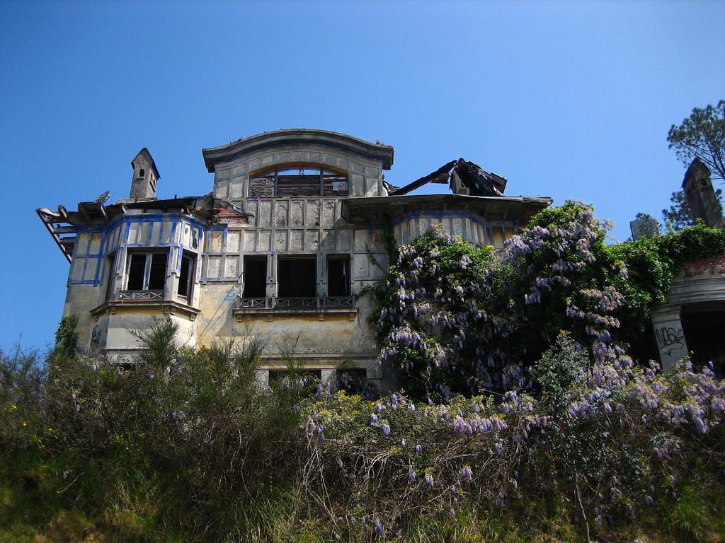 Casa abandonada, O Temple, Cambre. Provincia da Coruña, Galicia'482941151_fa7343225e_b.jpg'